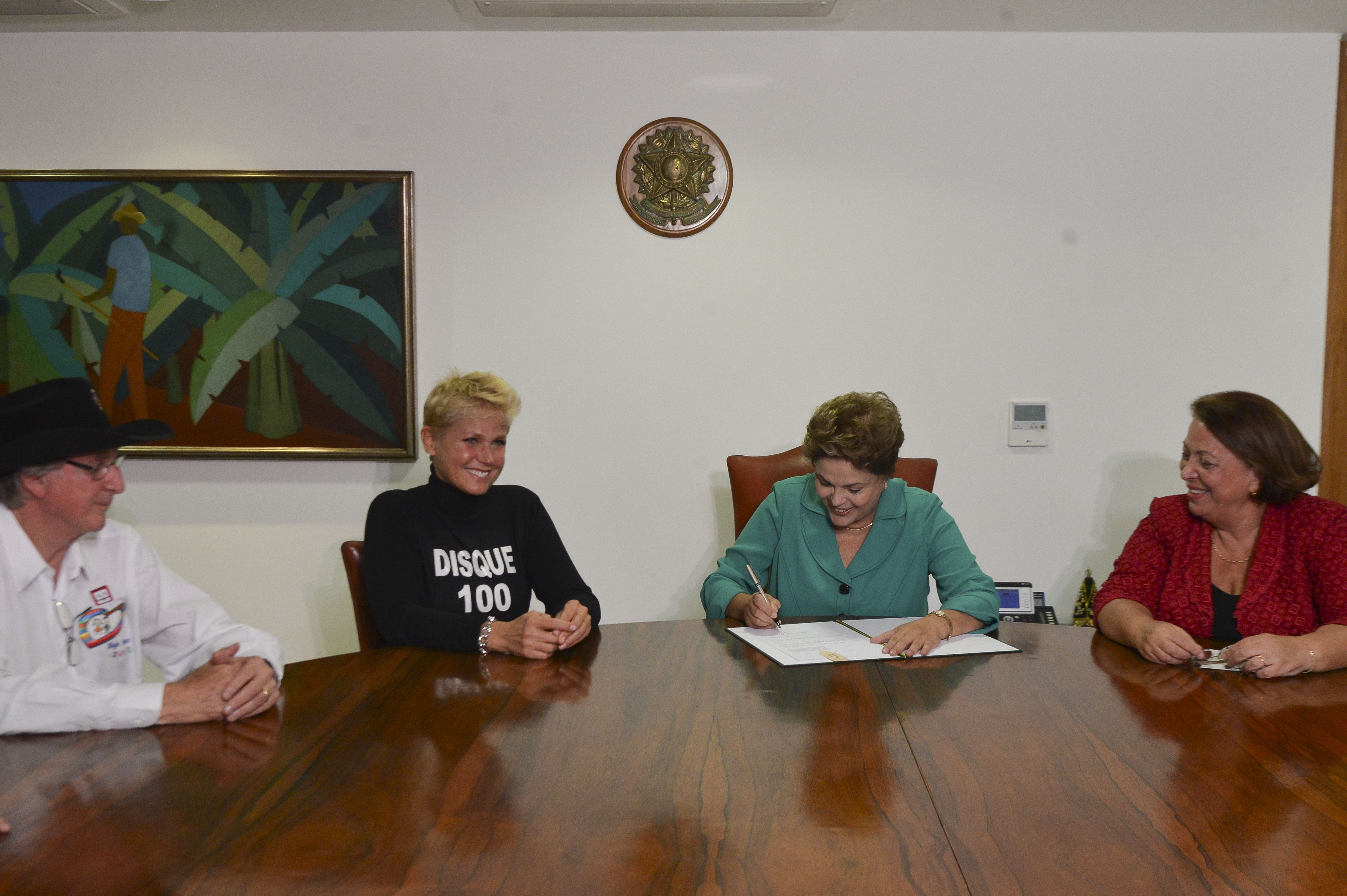 Dilma sanciona projeto que torna crime hediondo o abuso e a exploração sexual de crianças e adolescentes. E/D: os artistas Sérgio Reis e Xuxa, Dilma Rousseff e a ministra Ideli Salvatti.